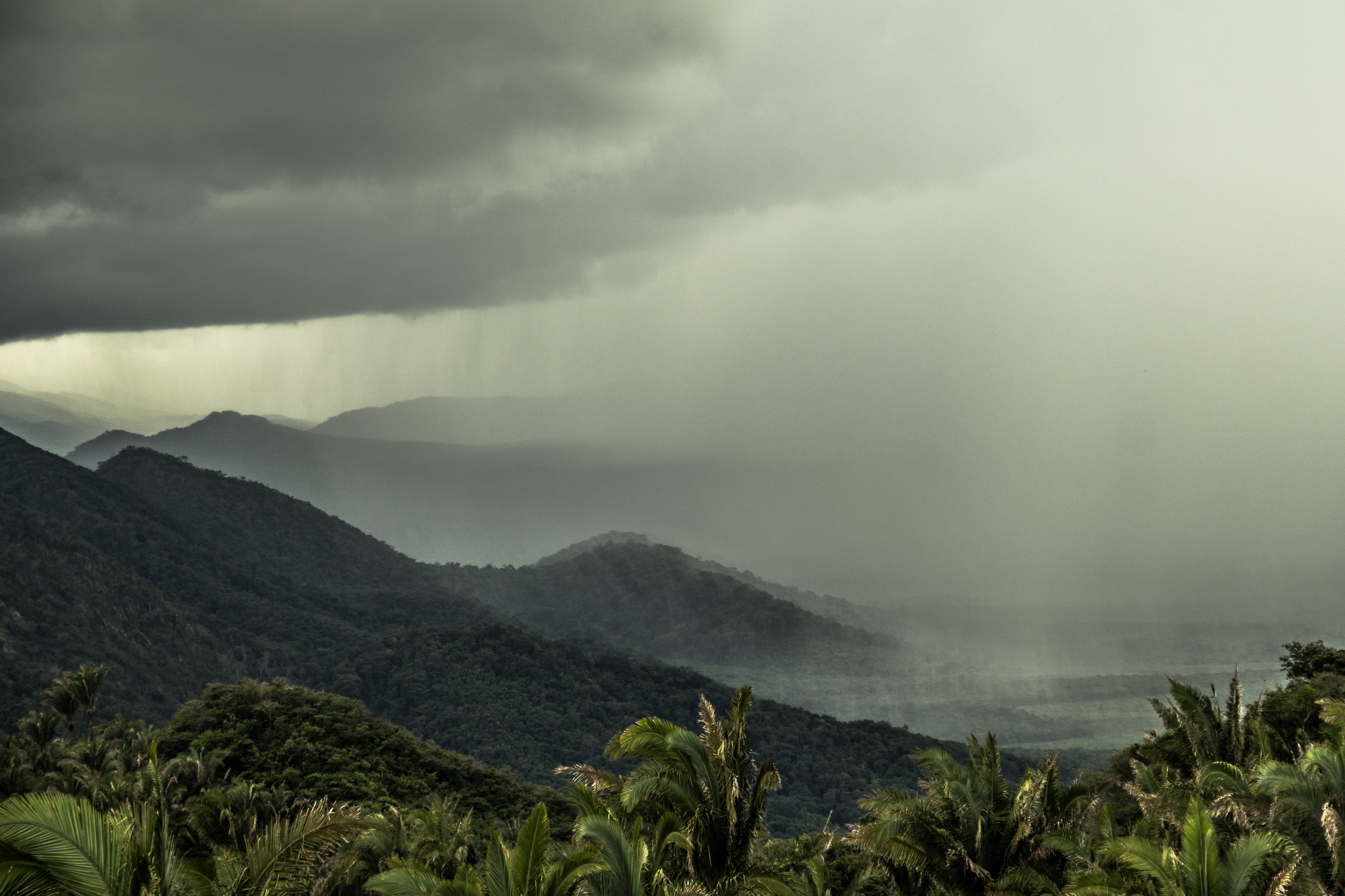 Essa foto foi feita em lugar chamado Castelo de Pedra em Viçosa do Ceará, cidade que fica na Região da Ibiapaba, Ceará. No horizonte a chuva se aproximava bem lentamente.